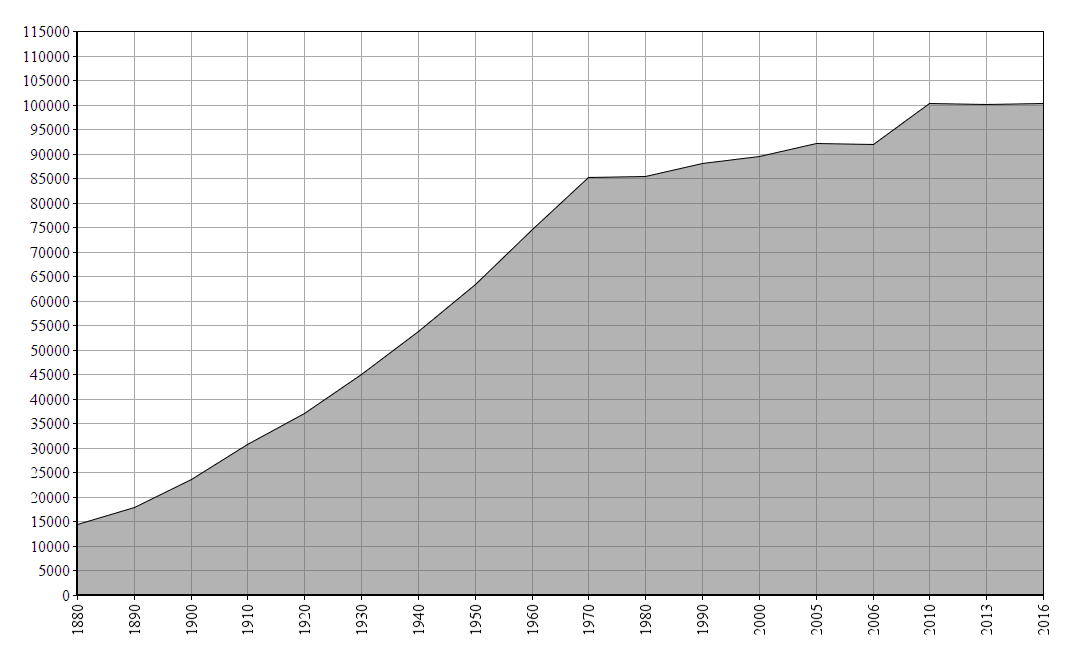 Dieses Bild zeigt die Bevölkerungsstatistik von Venlo